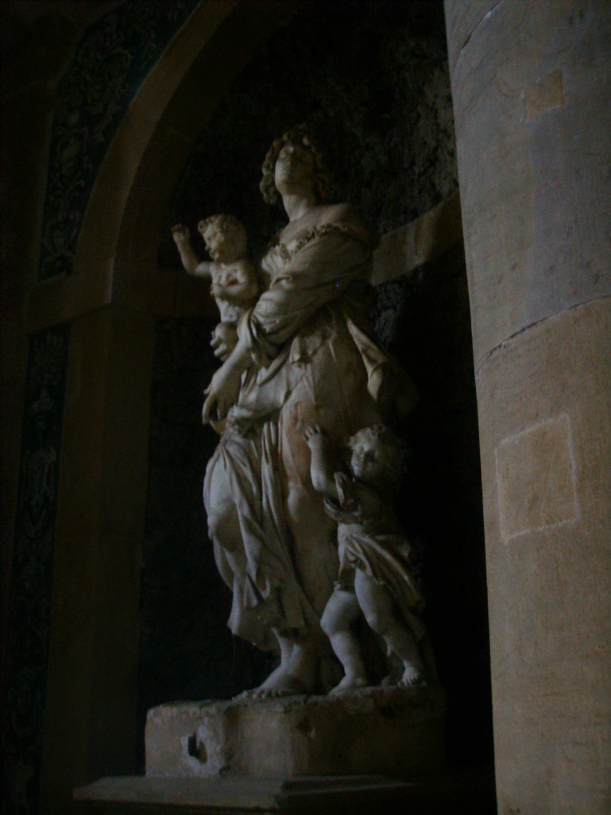 Grotta del Mosè nel cortile di Palazzo Pitti a Firenze. La Carità, una delle quattro statue rappresentanti Le Virtù del Principe secondo un impianto allegorico ideato da Francesco Rondinelli (erudito e bibliotecario dei granduchi): 1. La Carità, di Agostino Ubaldini, 1623; 2. L'Imperio, di Domenico Pieratti, 1635-36; 3. Lo Zelo, di Domenico Pieratti, 1635-36; 4. La Legge, di Antonio Novelli, 1635.